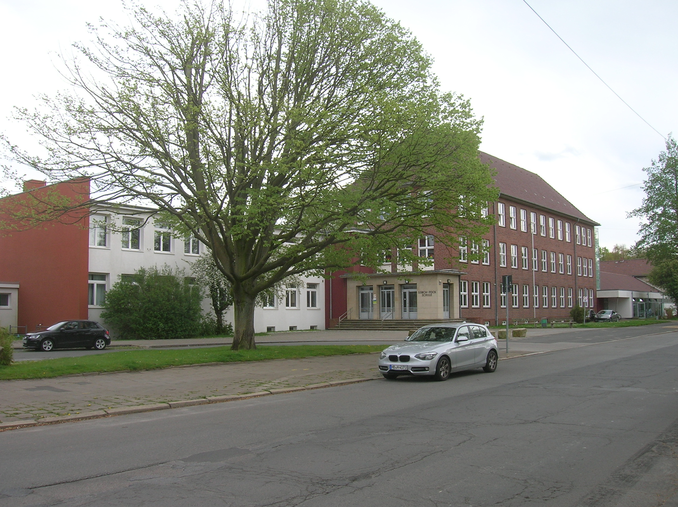 Gorch-Fock-Schule (Grundschule) an der Klußmannstraße in Bremerhaven-Geestemünde